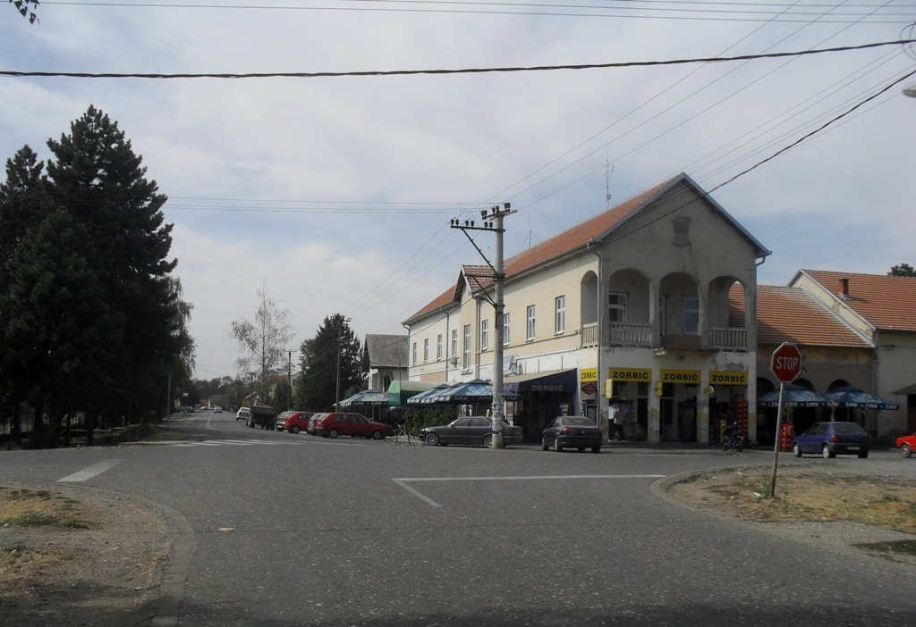 Центар Клења, Мачва, Србија.